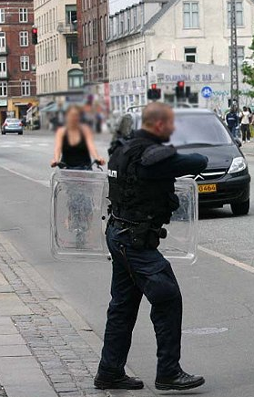 Politi fra Københavns politi med plexiglas skjold